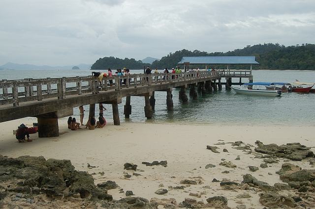 jeti pulau Beras Basah